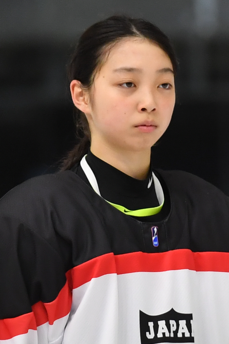 IIHF Eishockey Damen Weltmeisterschaft Division IA am 16. April 2017 in Graz.Bild zeigt Yoshino ENOMOTO (JPN).